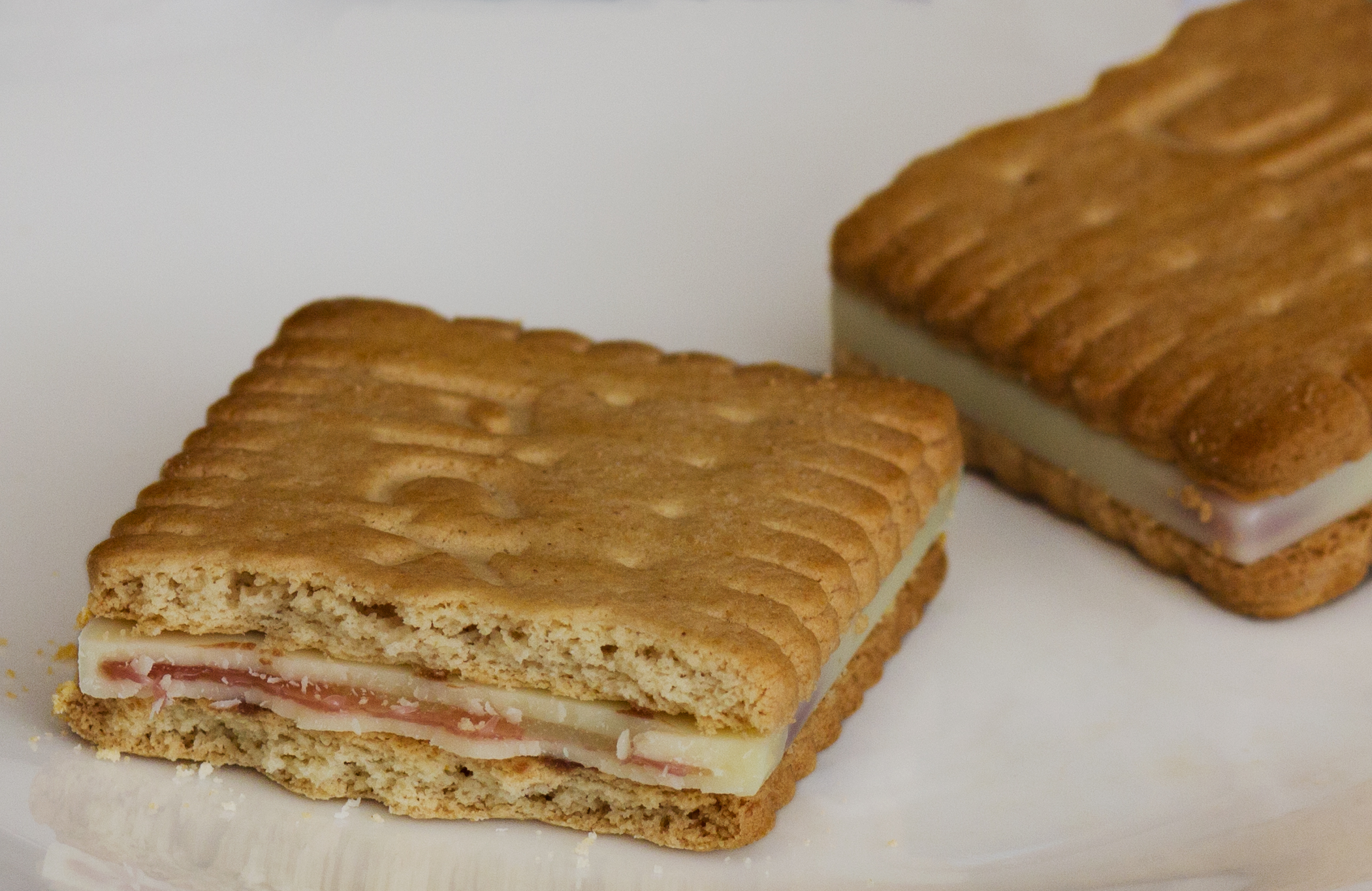 Bahlsen Pick Up! in Wildberry-Variante.